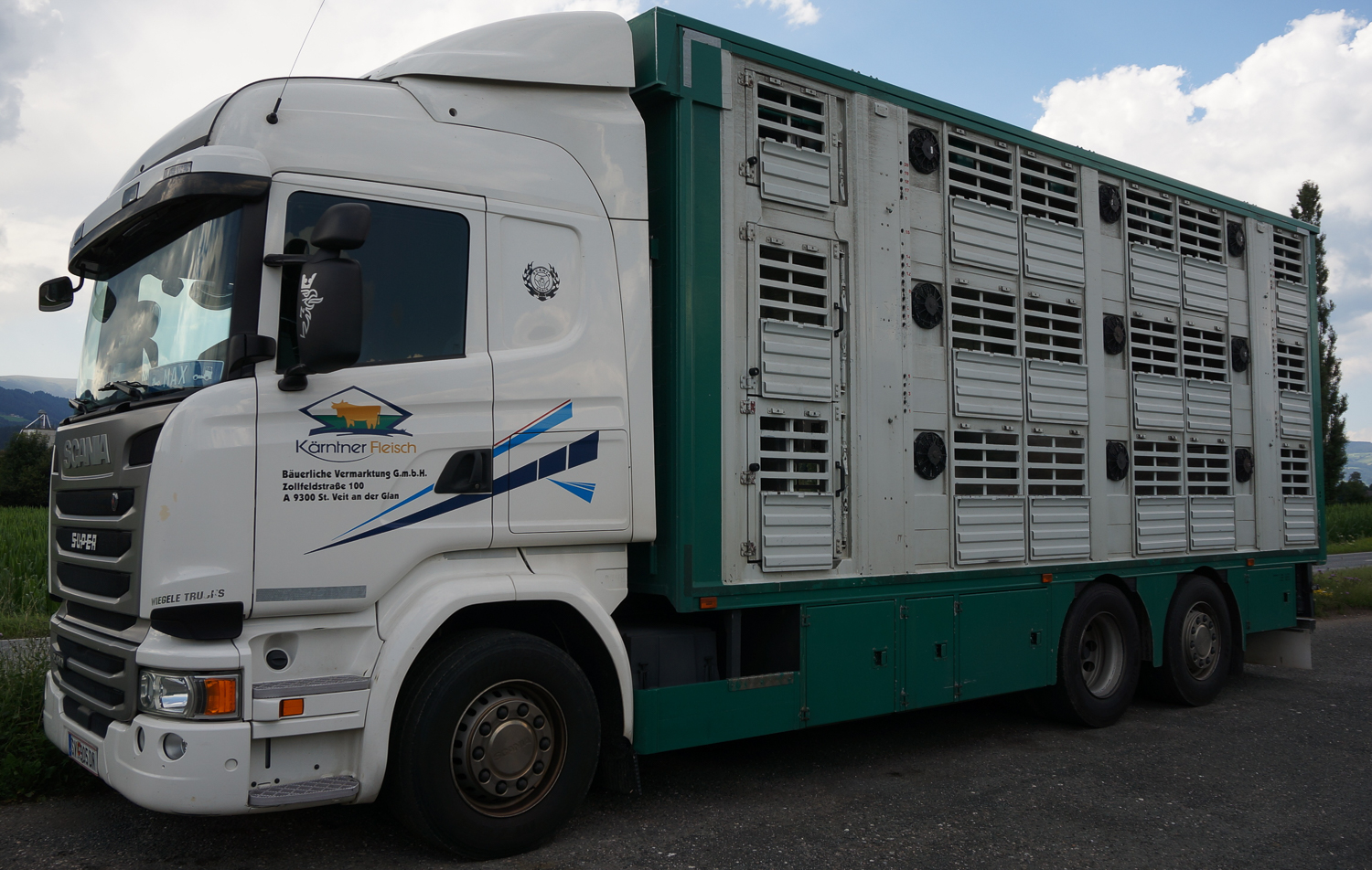 LKW für den Transport von lebenden Tieren mit Belüftungsschlitzen